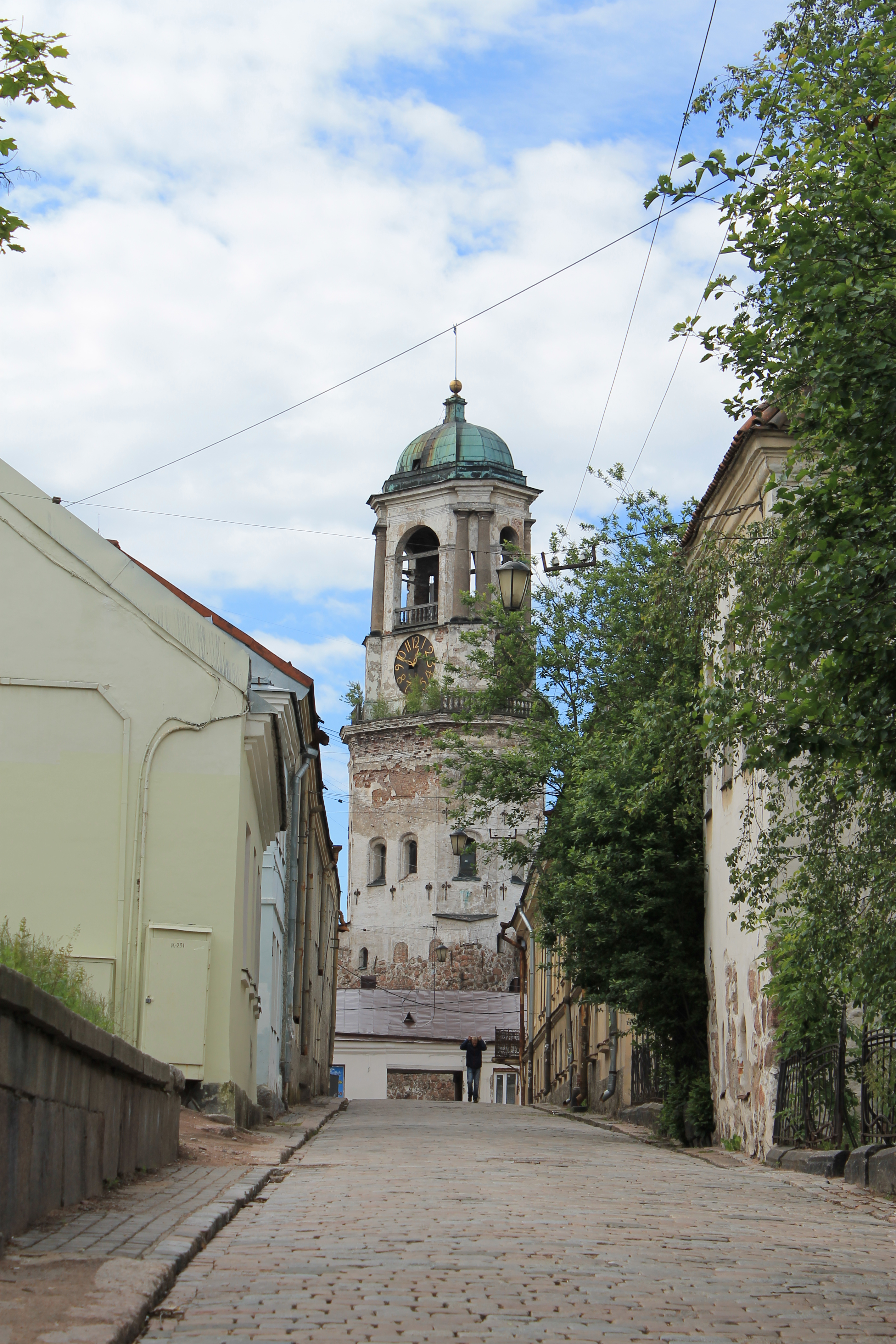 Часовая башня (Санкт-Петербург и Лен.область, Выборг, улица Сторожевой башни, 6)